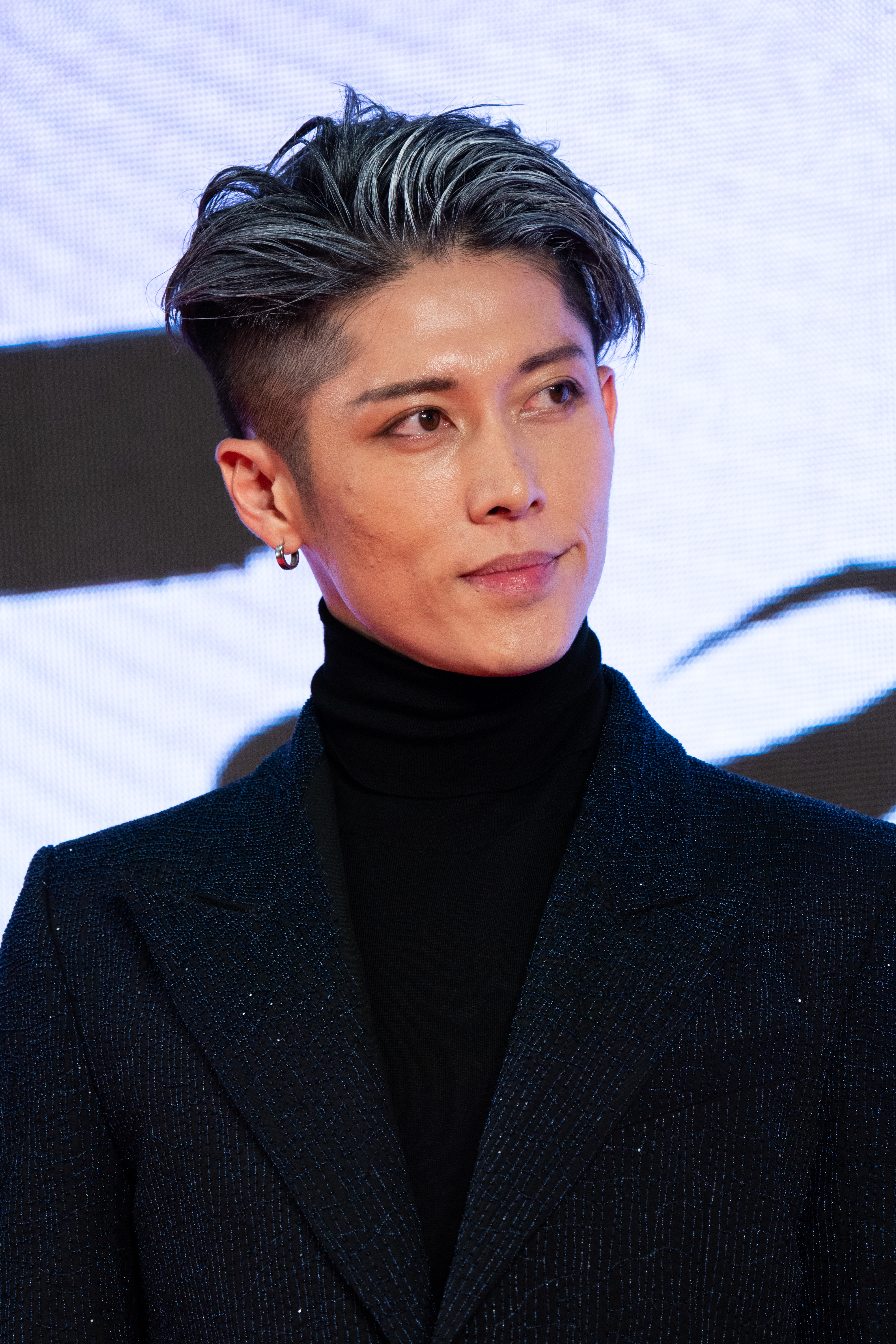 第32回 東京国際映画祭 オープニングセレモニー MIYAVI (アメリカン航空)